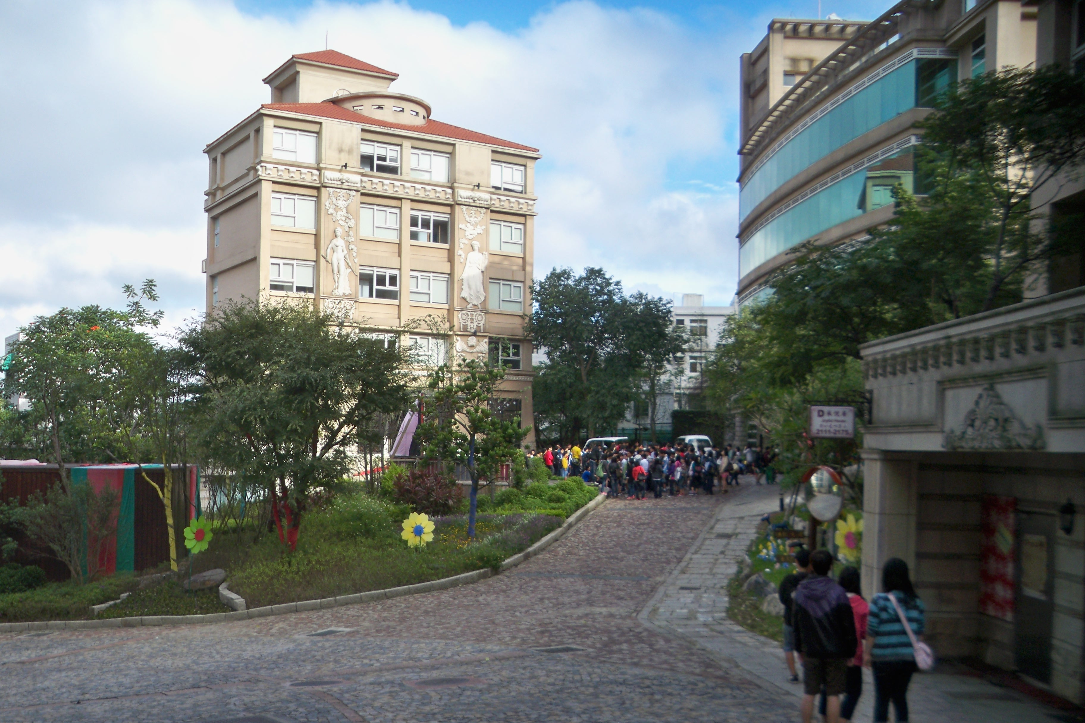 桃園市楊梅區 東森山莊 Eastem Villa(Yangmei,Taoyuan)